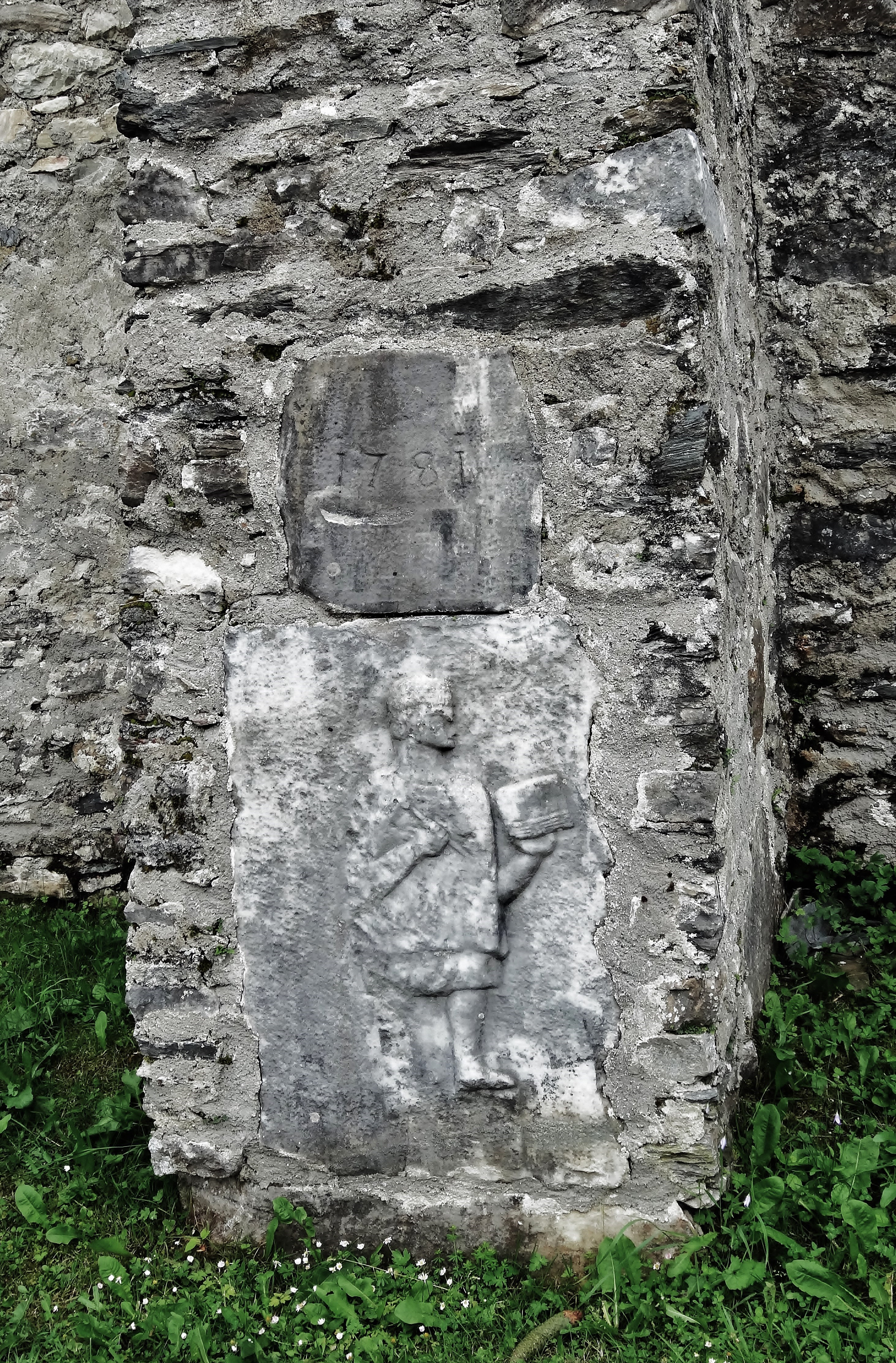 Römerstein in der nördlichen Kirchhofsmauer der kath. Pfarrkirche Hl. Jakobus d. Ä. (Tiffen)